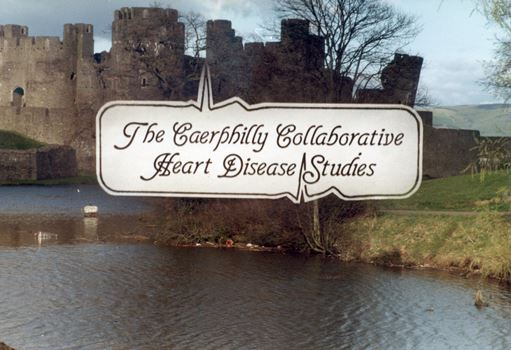 Own work.